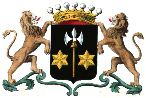 Armoiries de la famille de Gaiffier d'Hestroy